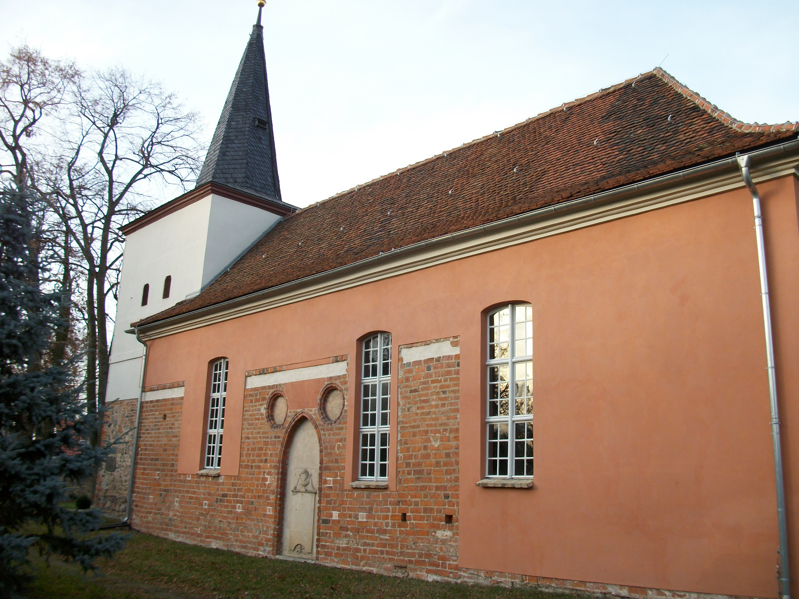 Dorfkirche Netzen, Baudenkmal